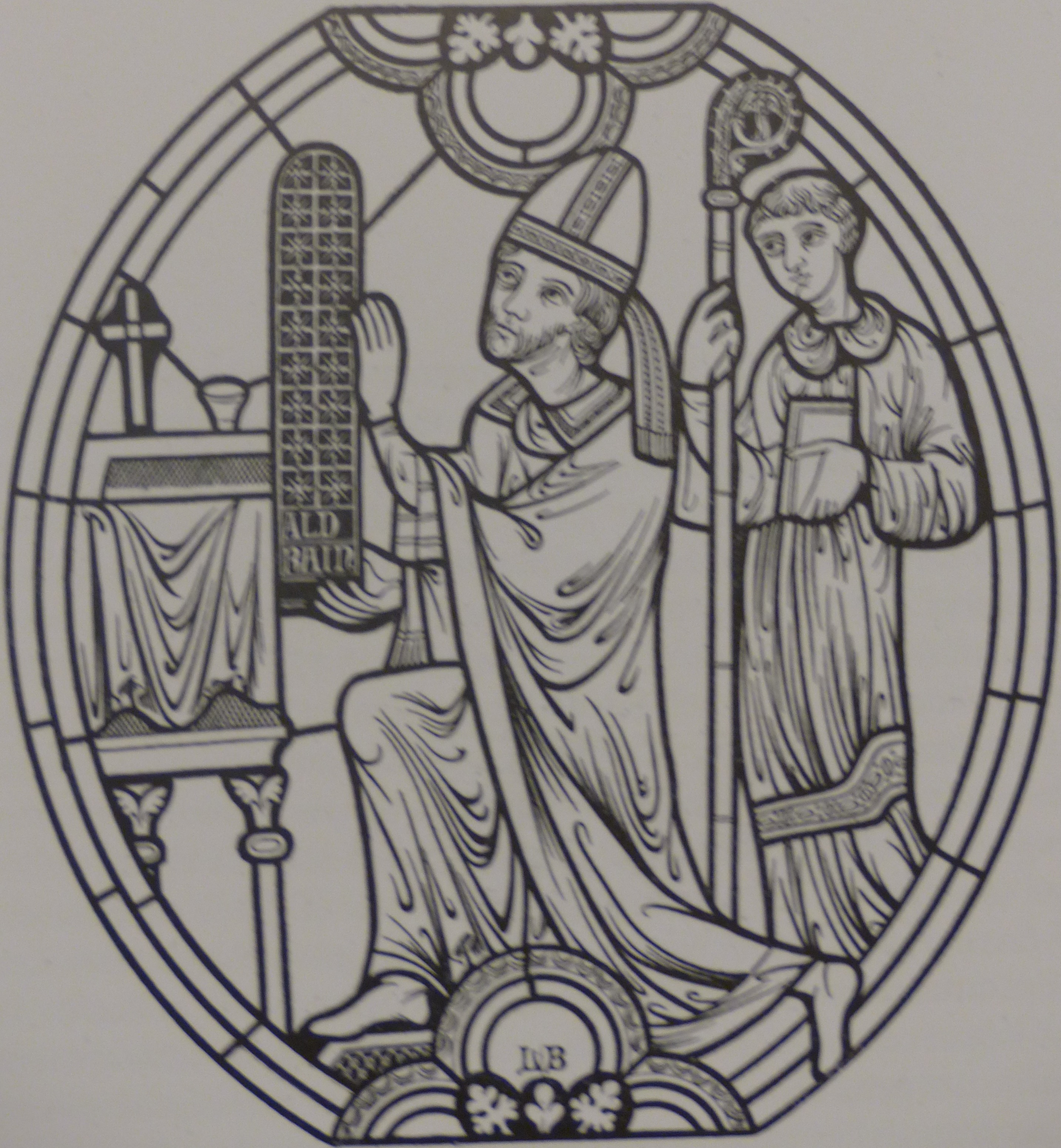 Vitrail de Lucien Bégule représentant Renaud de Forez